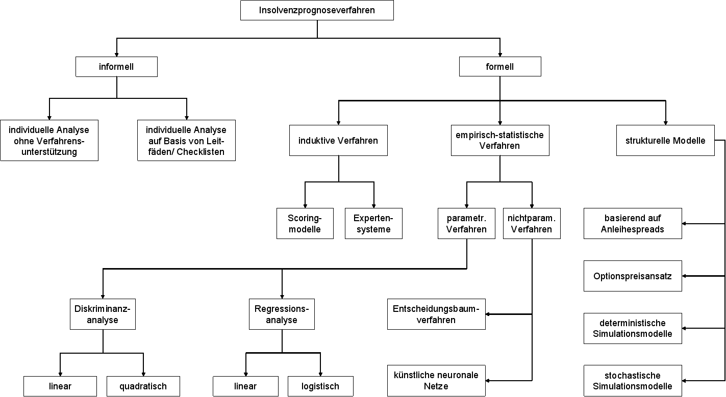 Übersicht Insolvenzprognoseverfahren, in Anlehnung an GÜNTHER, GRÜNING (2000, S. 40) und OENB (2004a, S. 32)